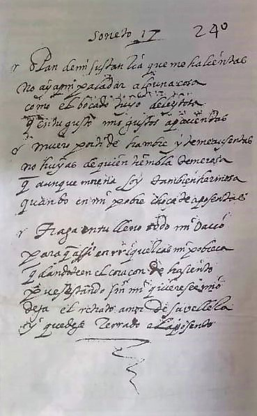 Soneto 17 manuscrito. Ana de la Trinidad